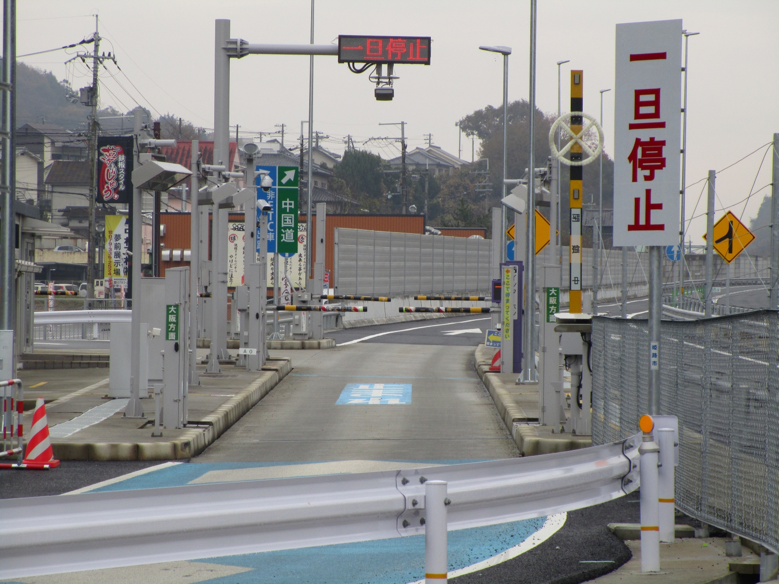 夢前スマートインターチェンジ 大阪方面（夢前バスストップより撮影）